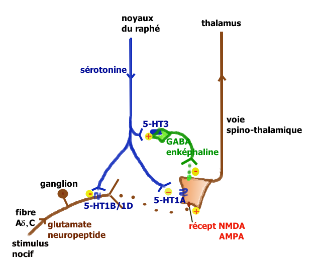 dessin fait d'après Millan Progress in neurobio 66 (2002)